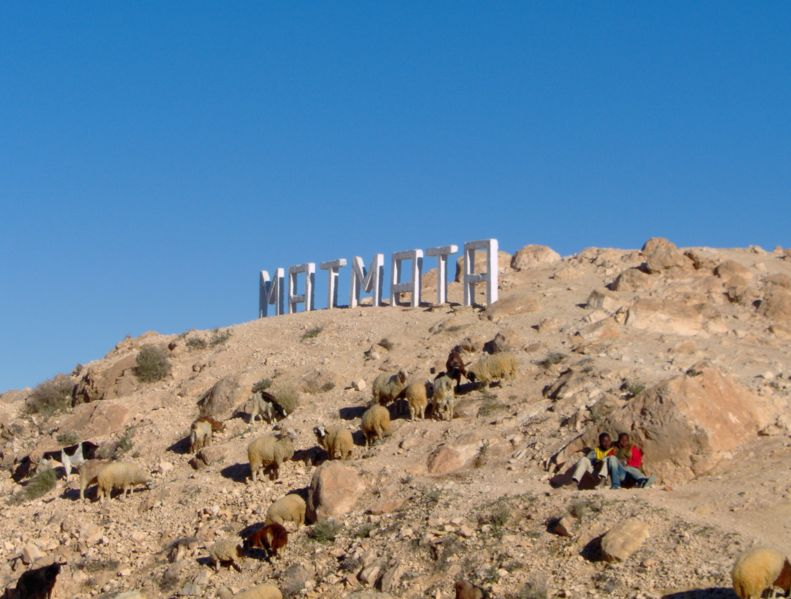 Photo prise au court d'un voyage à Matmata, village tunisien où l'on a tourné une partie de 'StarWars'